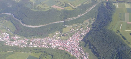 Albaufstieg der A8 bei Wiesensteig im Mai 2003.